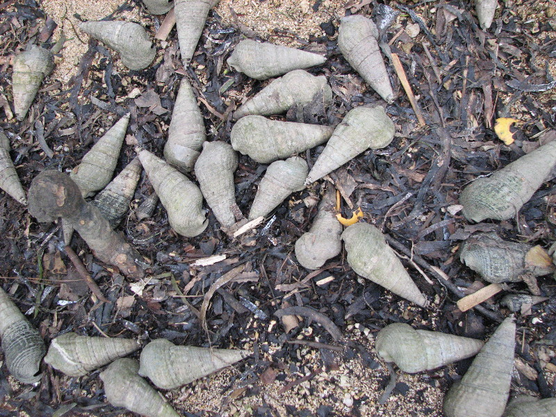 キバウミニナ(西表島・マングローブ林床): Terebralia palustris in Iriomote is.